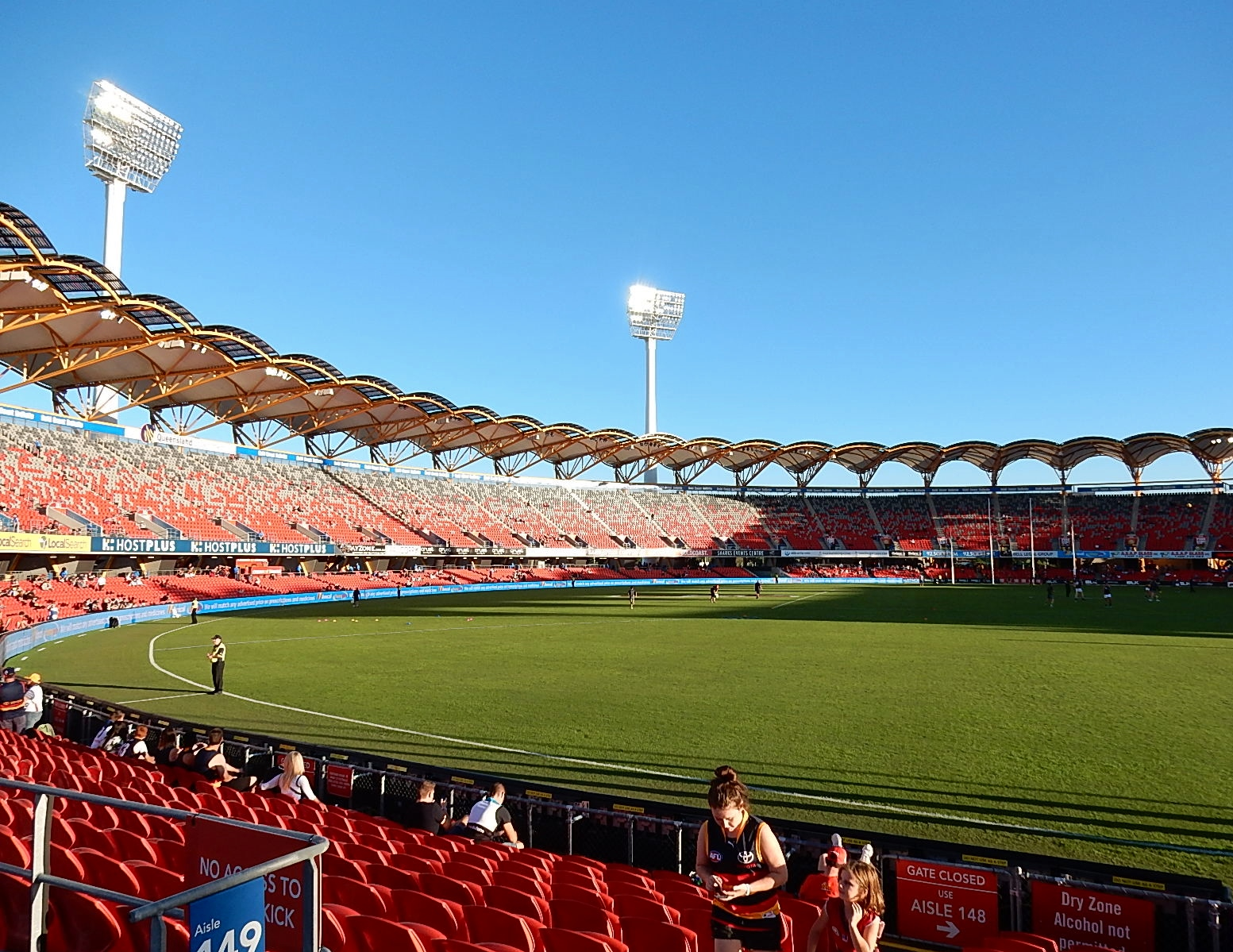 Sunny Stadium